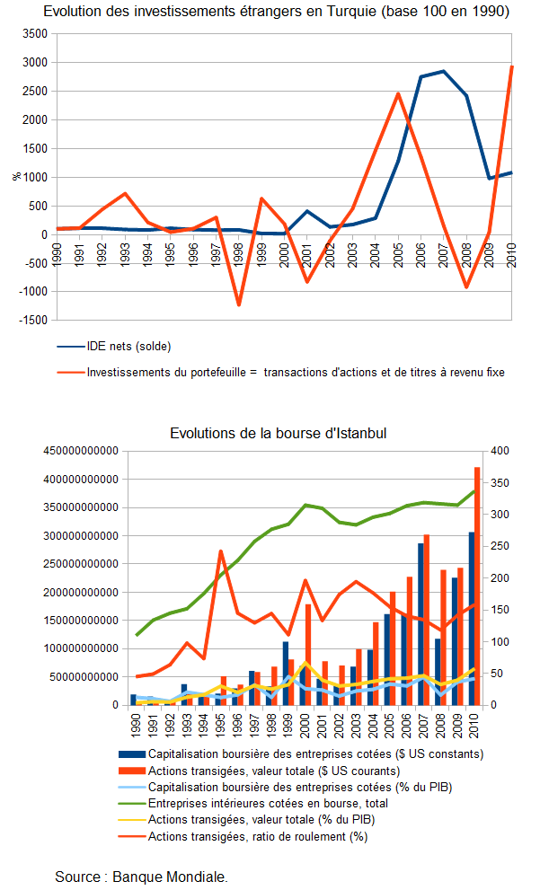 Évolution des investissements et de la bourse en Turquie - Source: Banque Mondiale